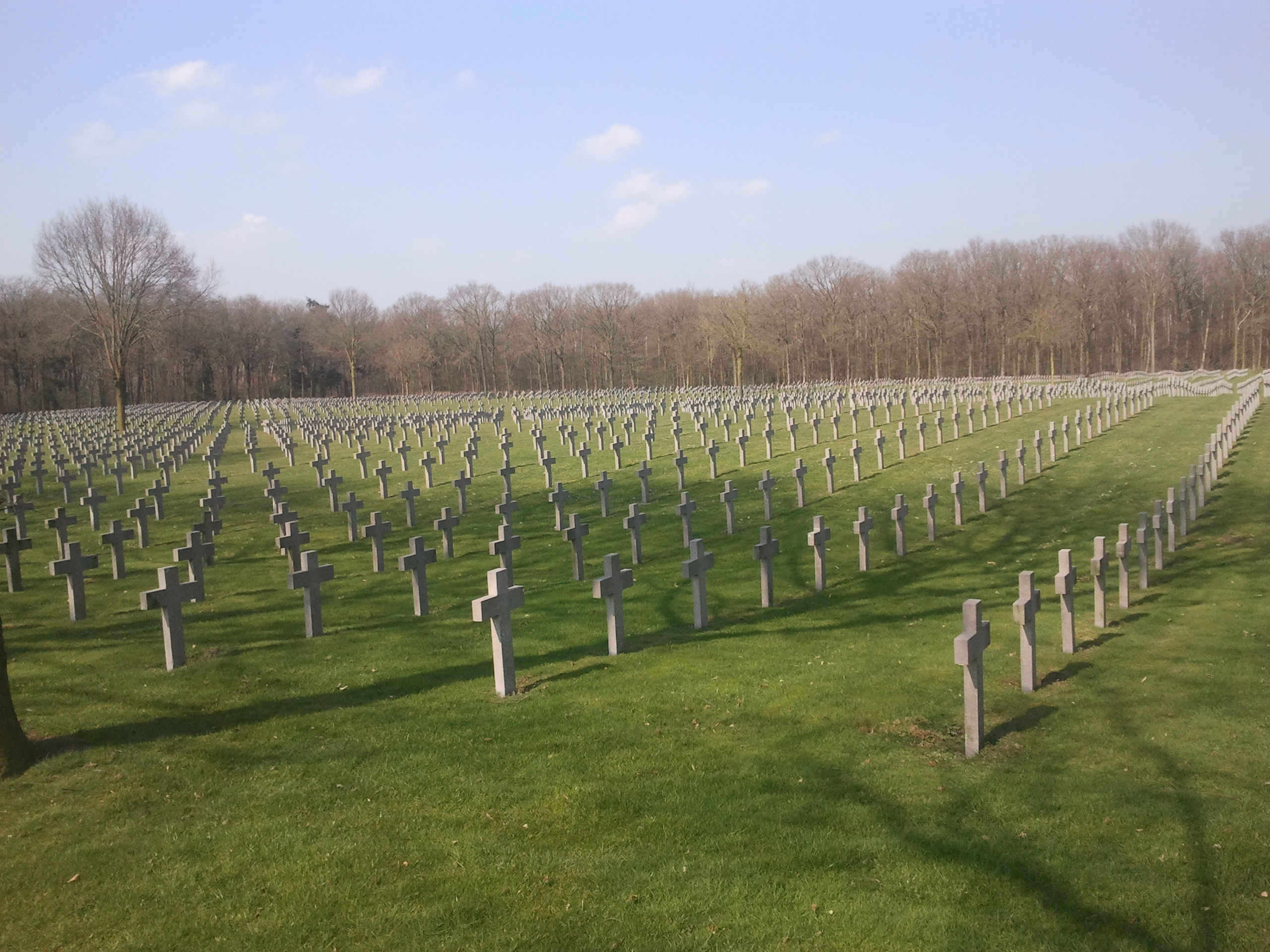 De rechter helft van de enorme plaats waar alle kruisjes staan van de overledene Duitsers.